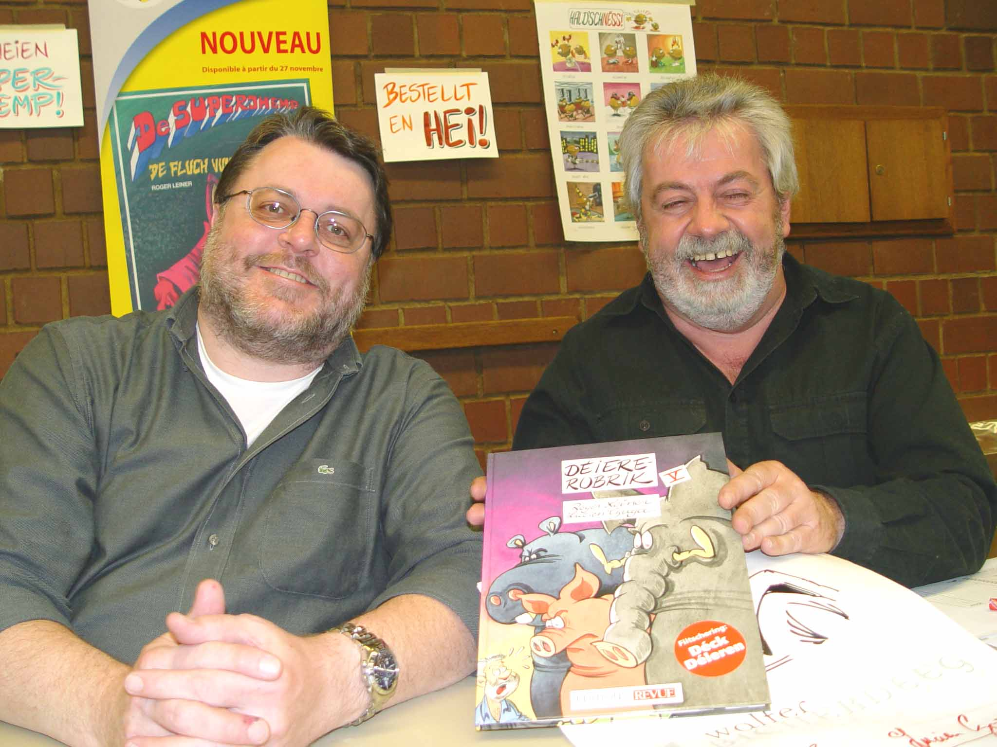 Leiner Czuga.